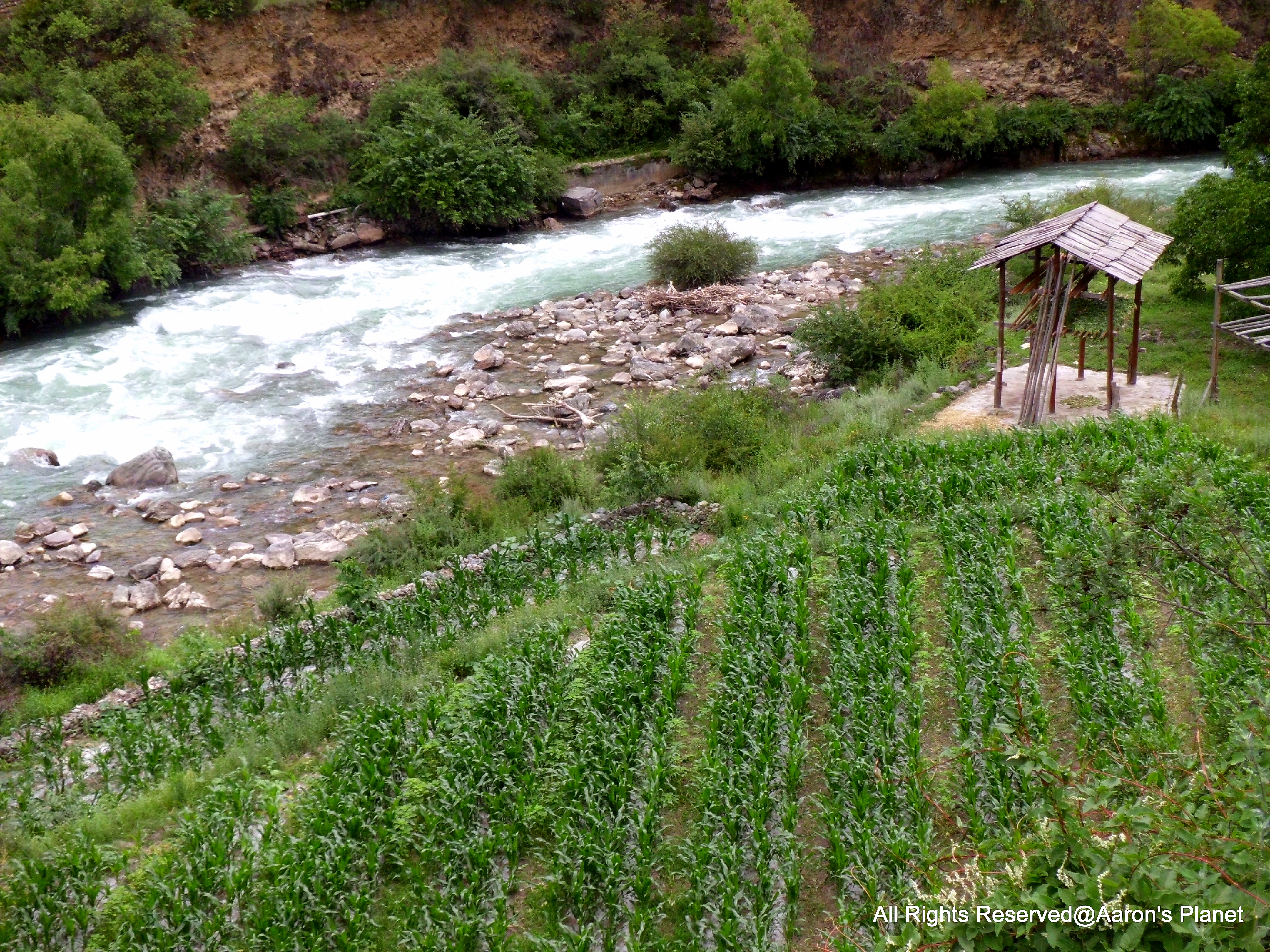 云南 德钦 霞若乡 珠巴洛河